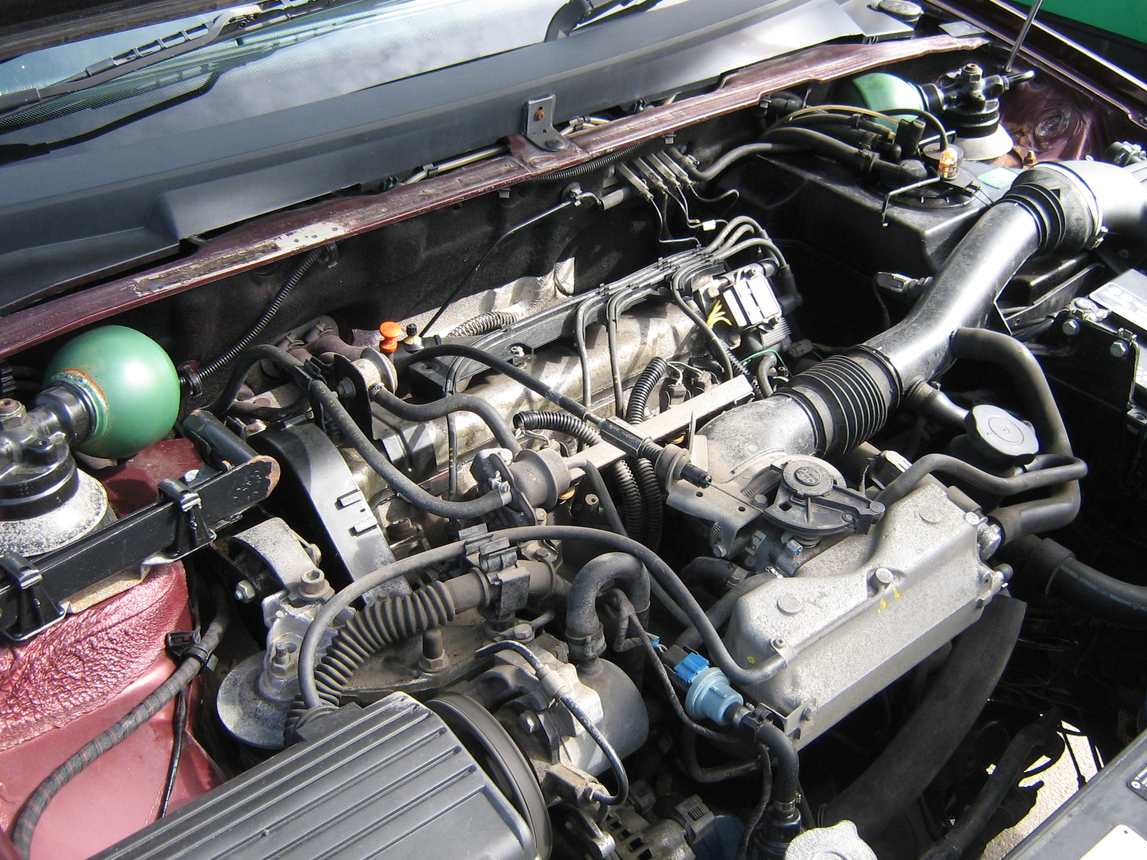 1990 Citroen XM Engine